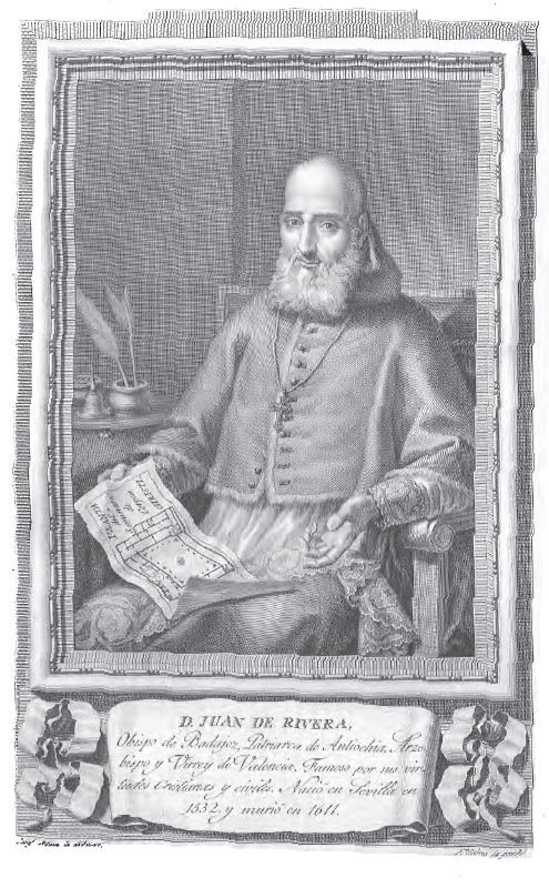 Retrato de Juan de Rivera.